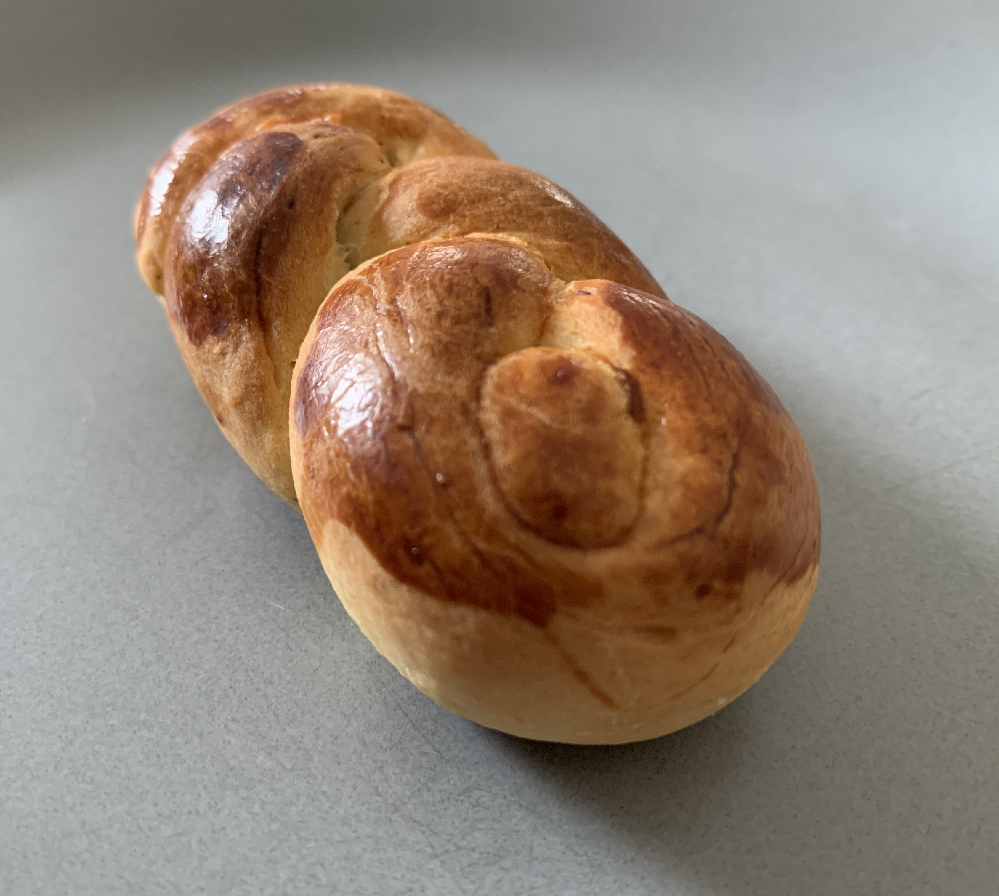 Un tcheurek arménien (en France, février 2020).